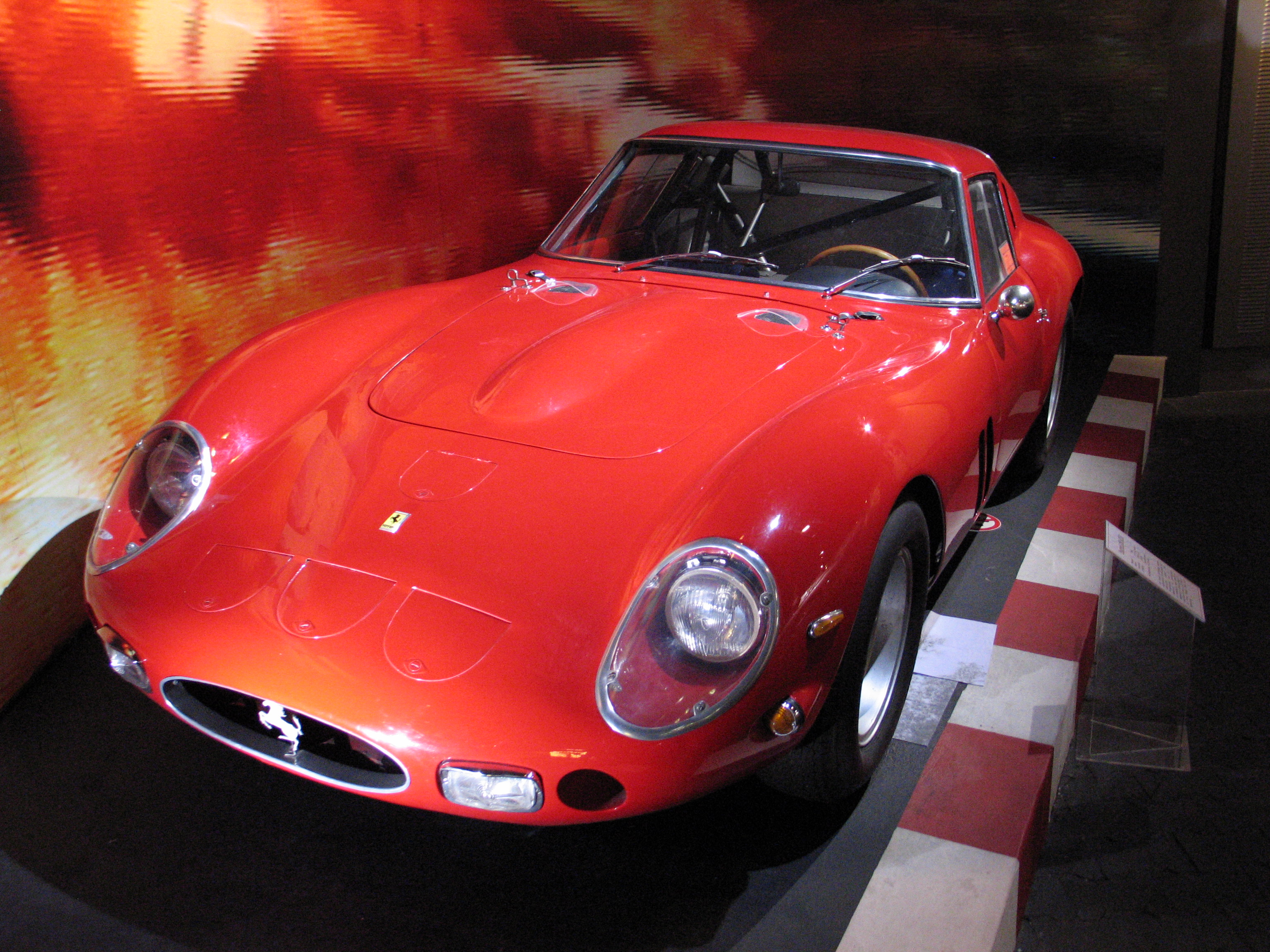 Bellissima!